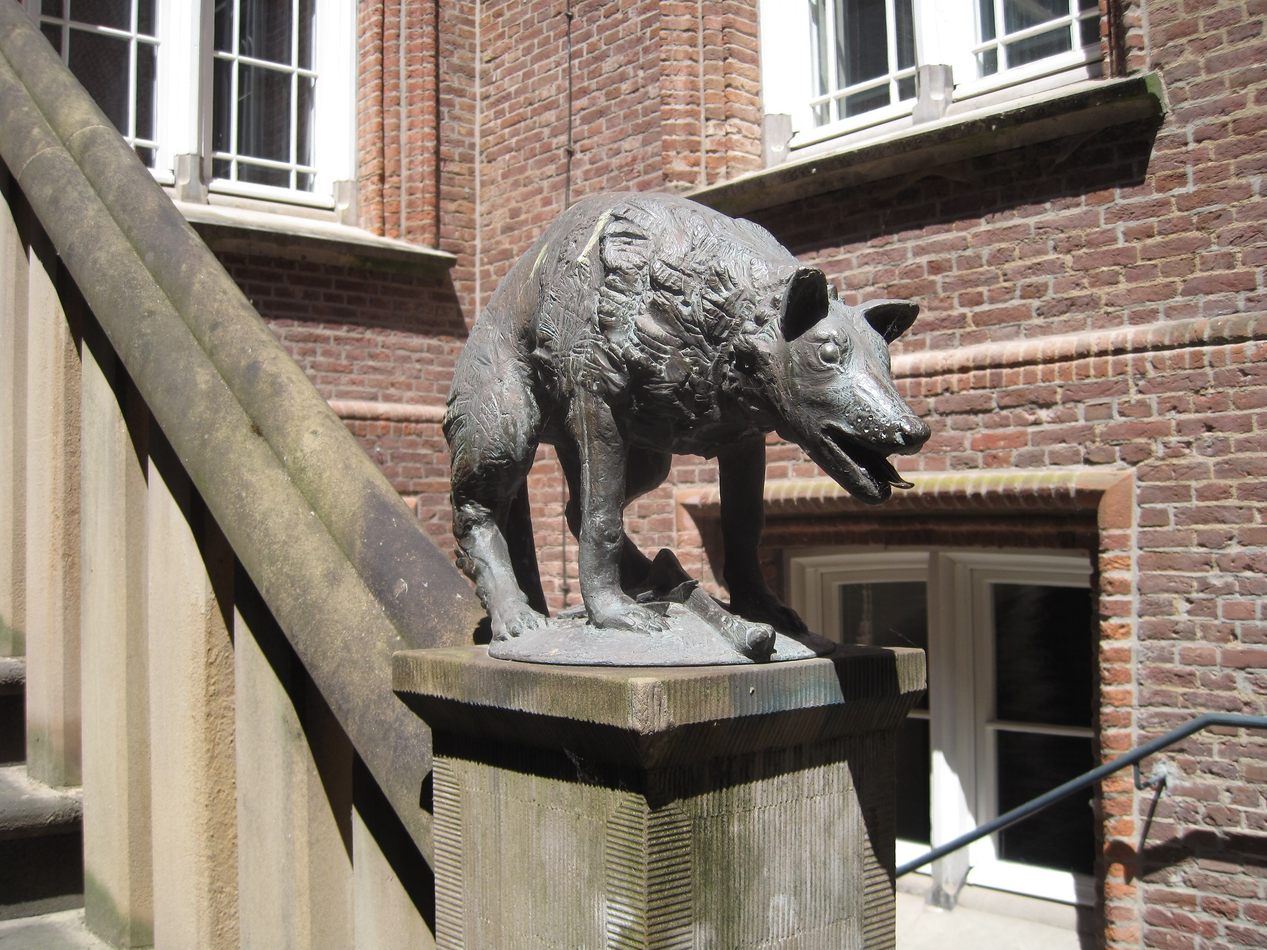 Tierfigur am unteren Ende des Treppenaufganges im Innenhof von Schloss Moyland bei Bedburg-Hau.